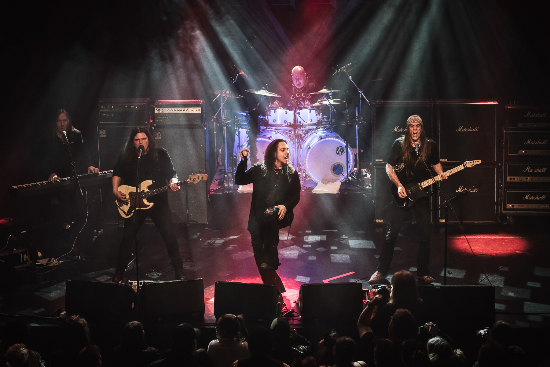 TNT live på Union Scene i Drammen 2018.